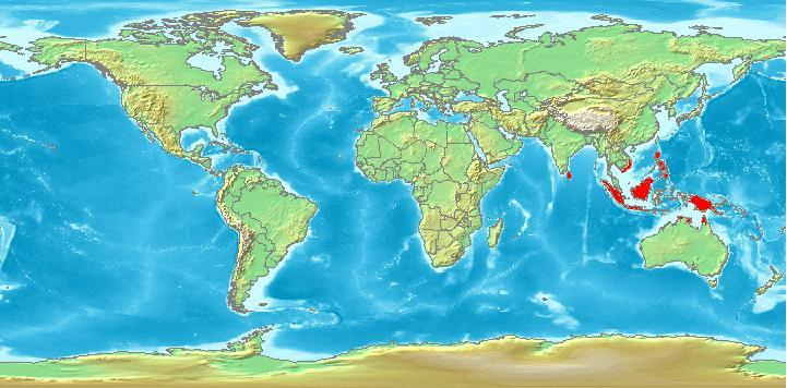 Hanguanaceae mapa de distribución